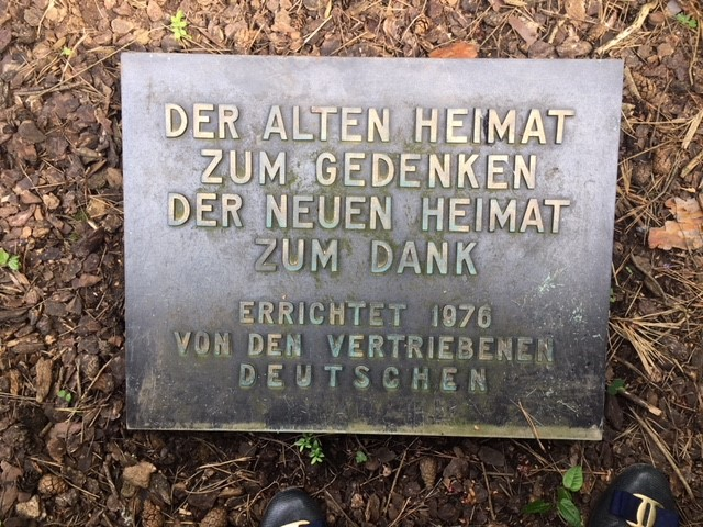 Gedenktafel am Mahnmal der Vertriebenen von Oskar Kreibich auf der Maubacher Höhe in Backnang